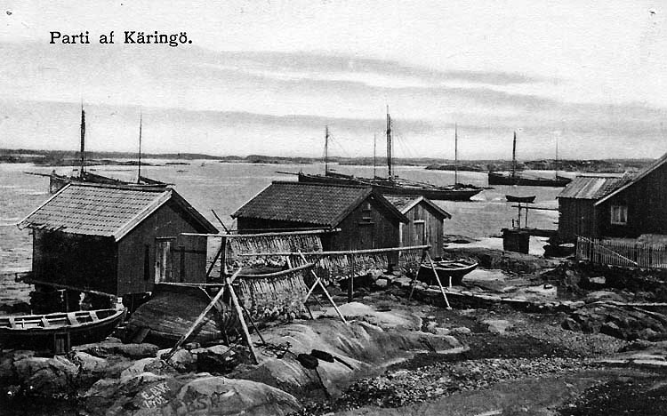 Käringön